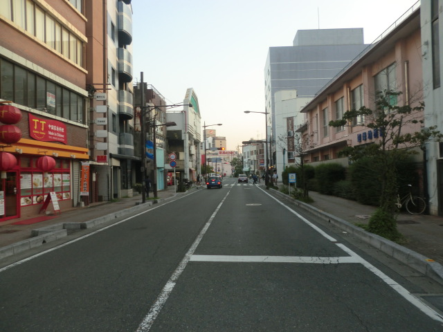 福岡県道758号線の終点である日吉交差点です。